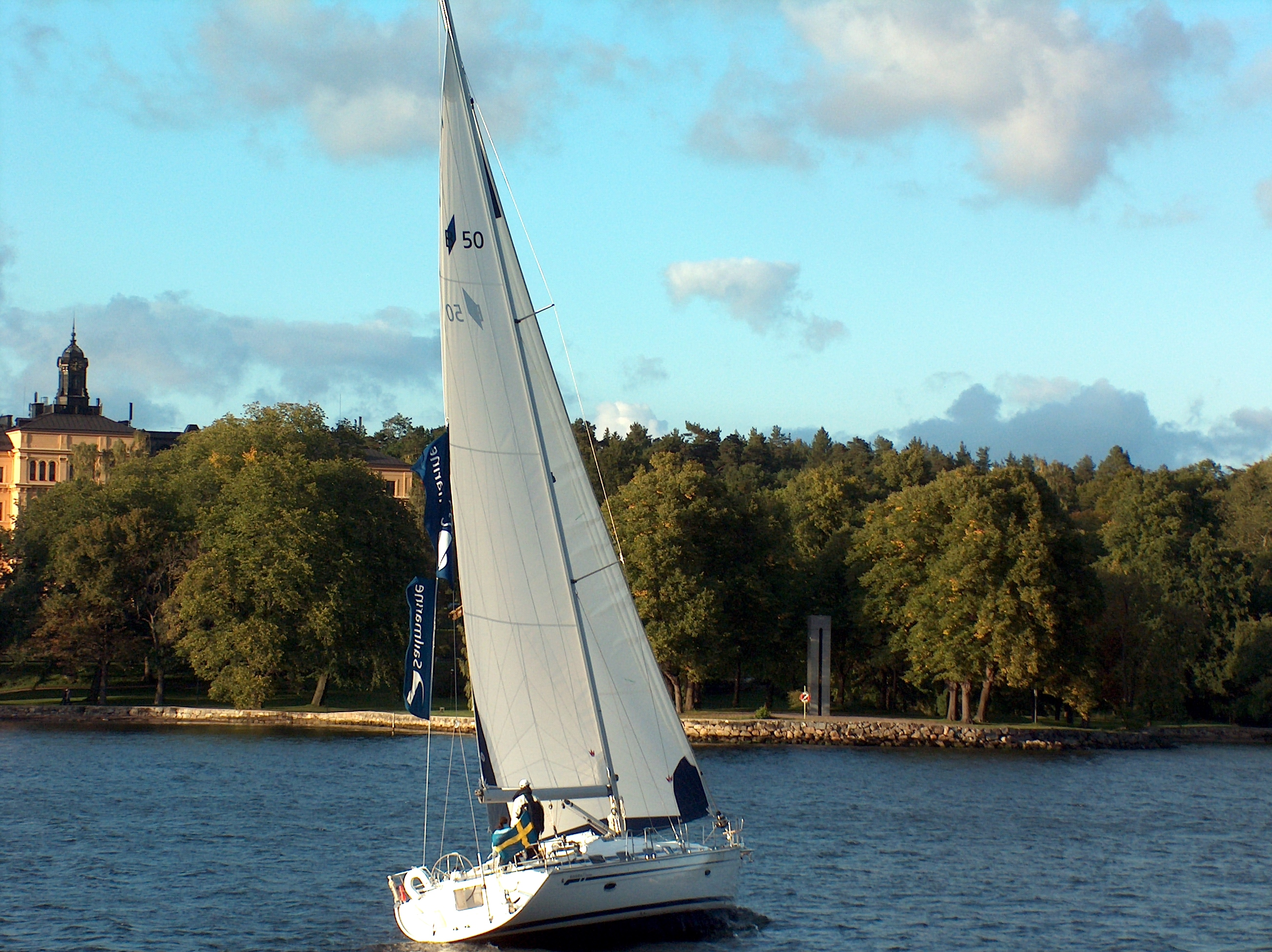 Yatching in Stockholm